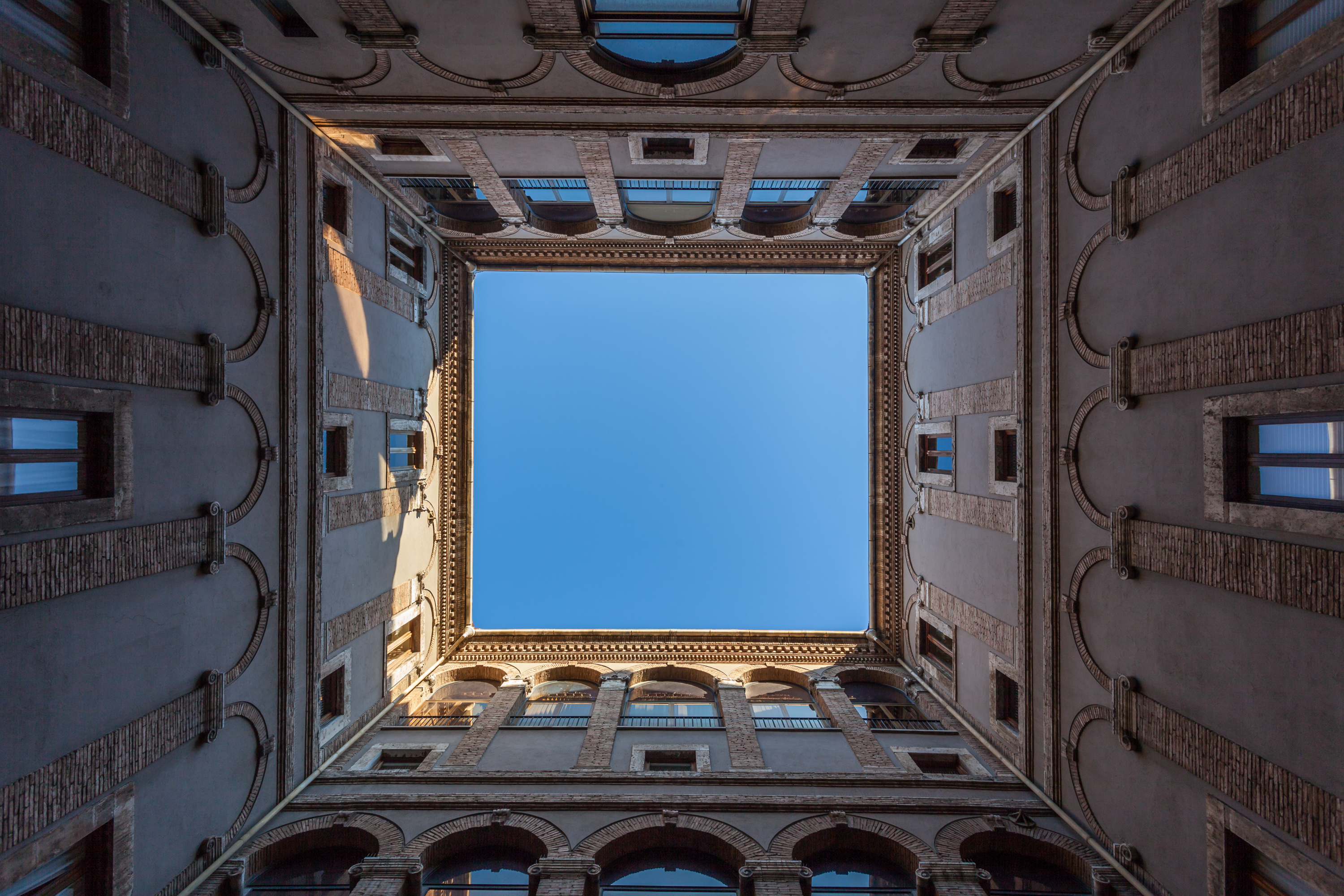 Terni. Palazzo Spada, interno This is a photo of a monument which is part of cultural heritage of Italy.